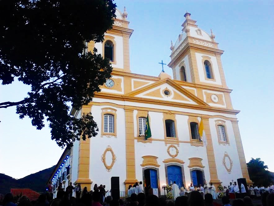 Missa campal no dia de Corpus Christ, em 15 de junho de 2017, em frente a Catedral de Nossa Senhora da Glória, em Valença, estado do Rio.